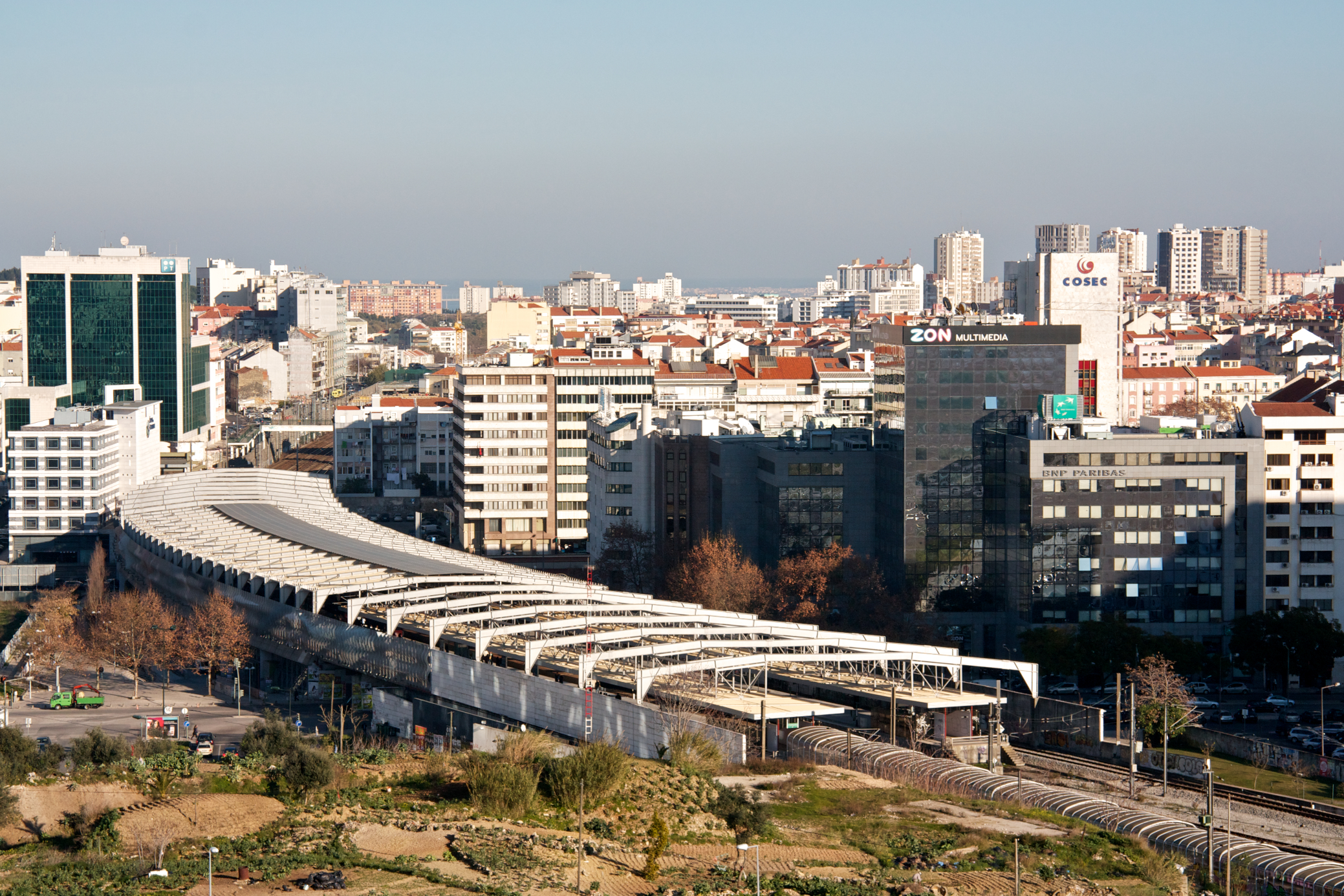 Tipo: ES Estação Satélite Local: Lisboa [Linha de Cintura, PK 6] Data e hora: 19 de Janeiro de 2012 [15h50]